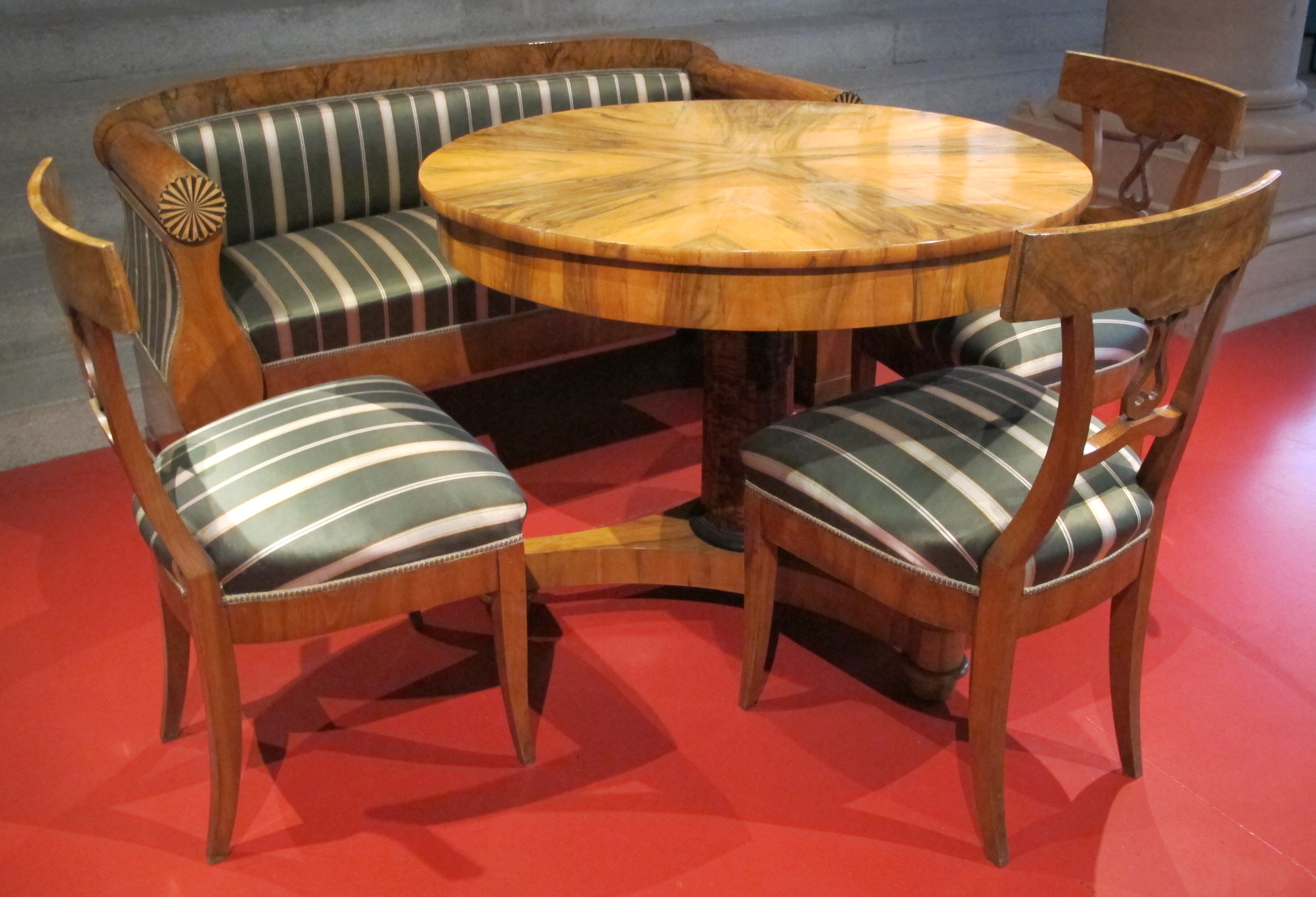 Gruppo di mobili biedermeier, 1820 circa